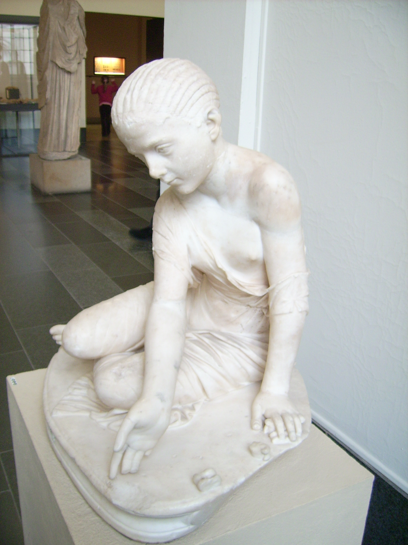 Knöchelspielerin in der Antikensammlung Berlin/Pergamonmuseum (Sk 494/R 75), 1730 auf dem Caelius in Rom gefunden, Ende des 2. Jahrhunderts, römische Kopie nach hellenistischen Vorbild, Marmor, Höhe 70 cm